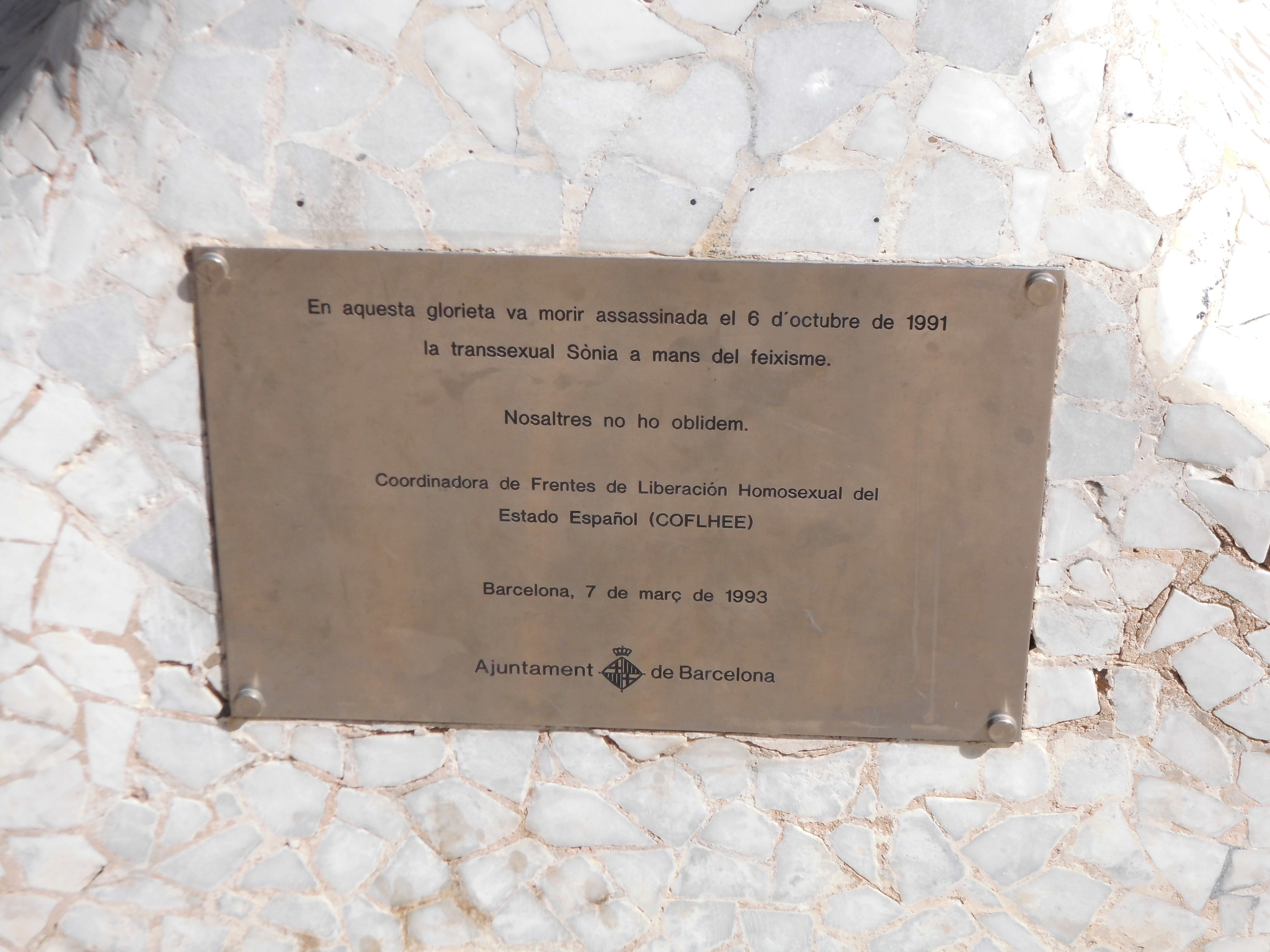 Sònia. Parc de la Ciutadella -Kiosc de música- (Barcelona)